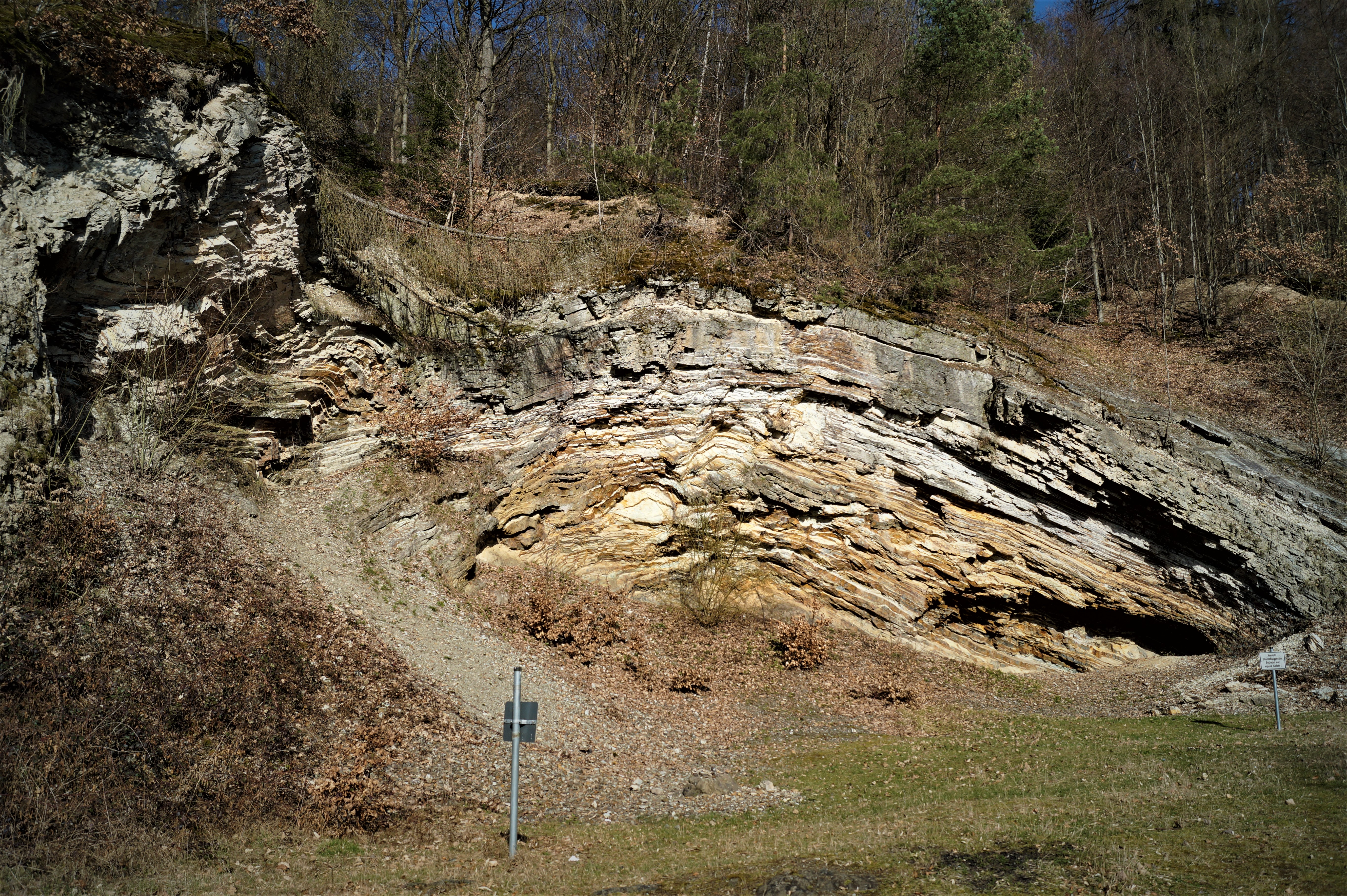 Kieselschieferabbau